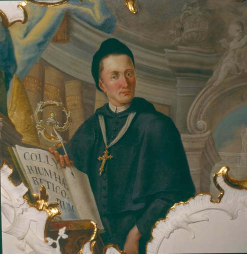 Portrait Steyrers